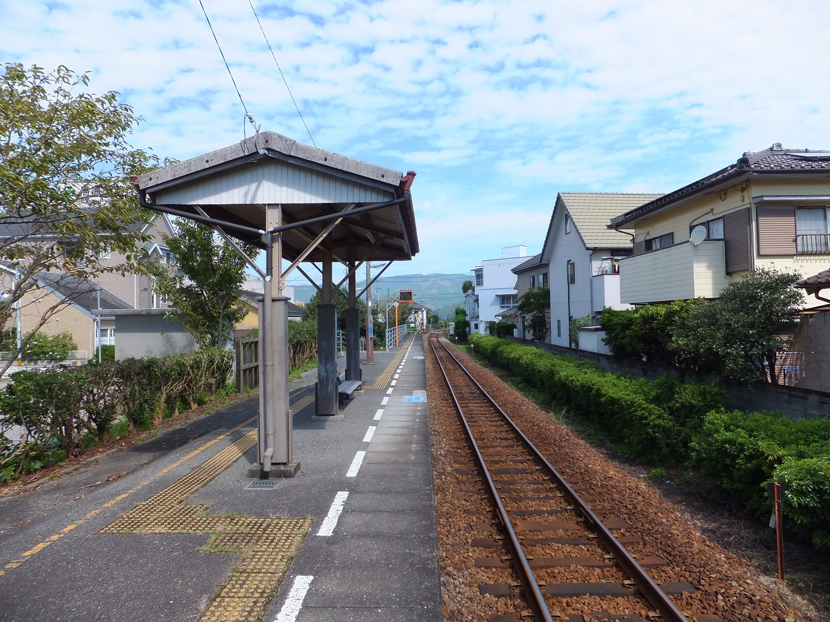 徳島県阿南市 JR牟岐線阿南駅